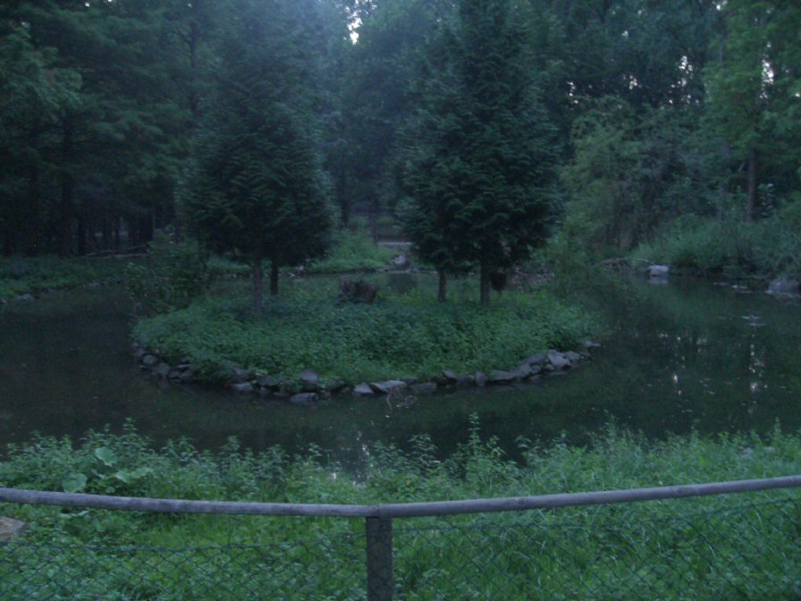 Anlage für Wassergeflügel im Wildtiergehege im Grevenbroicher Bend